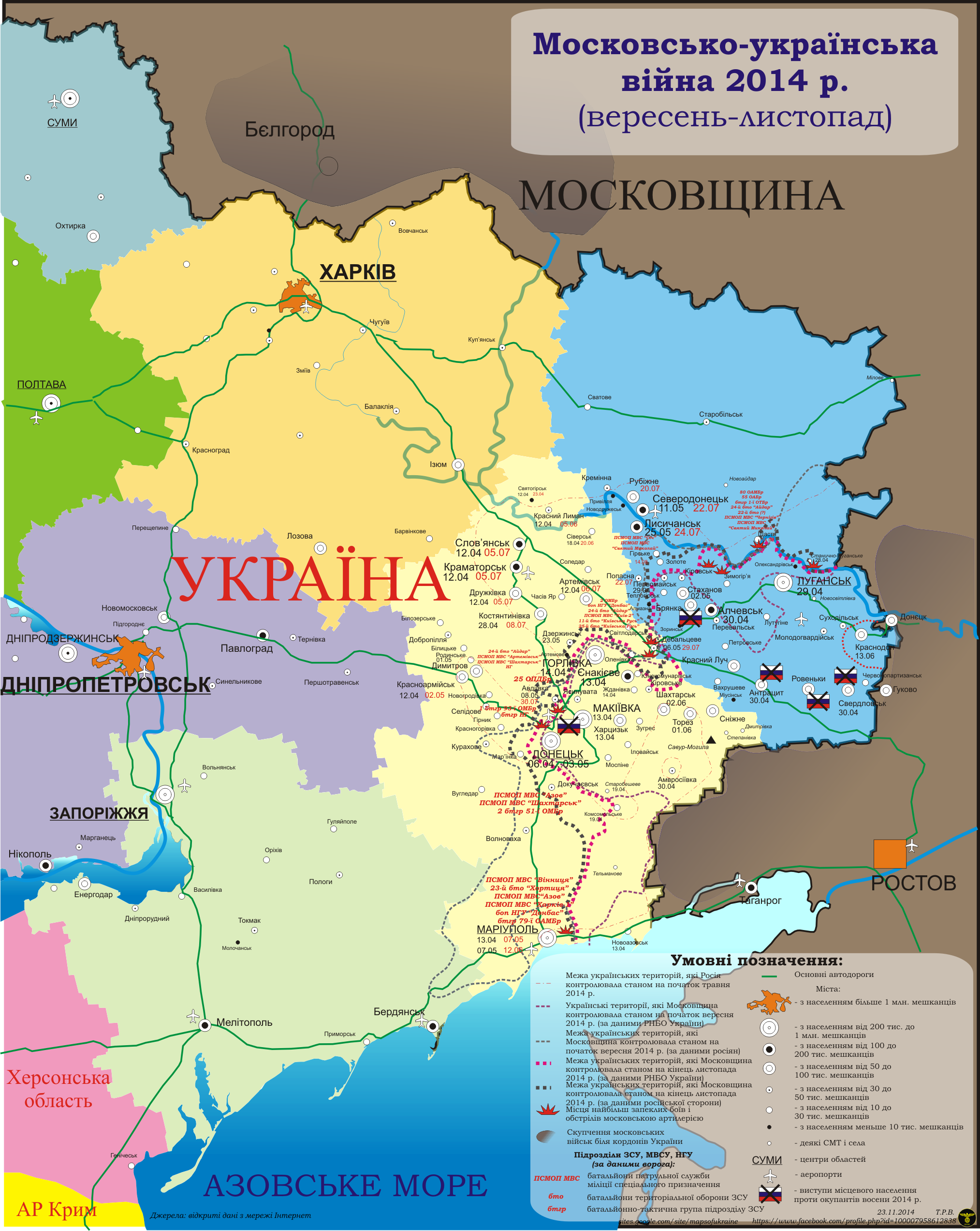 Московсько-українська війна. Осінь 2014